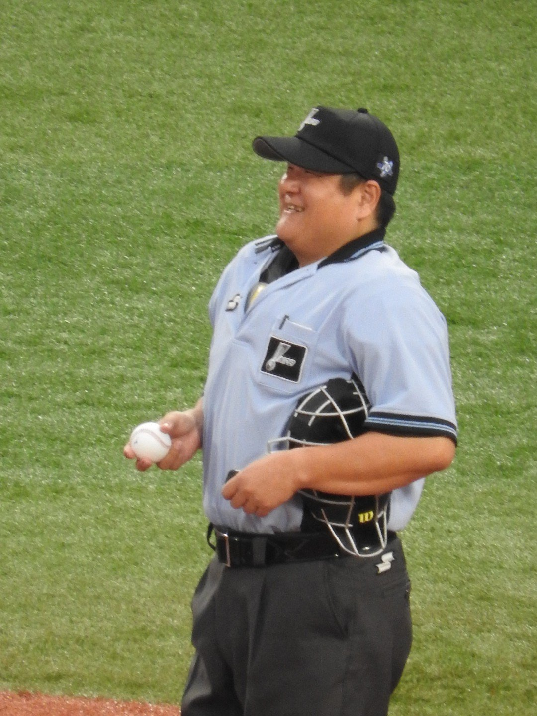 2019年7月16日横浜スタジアムにて